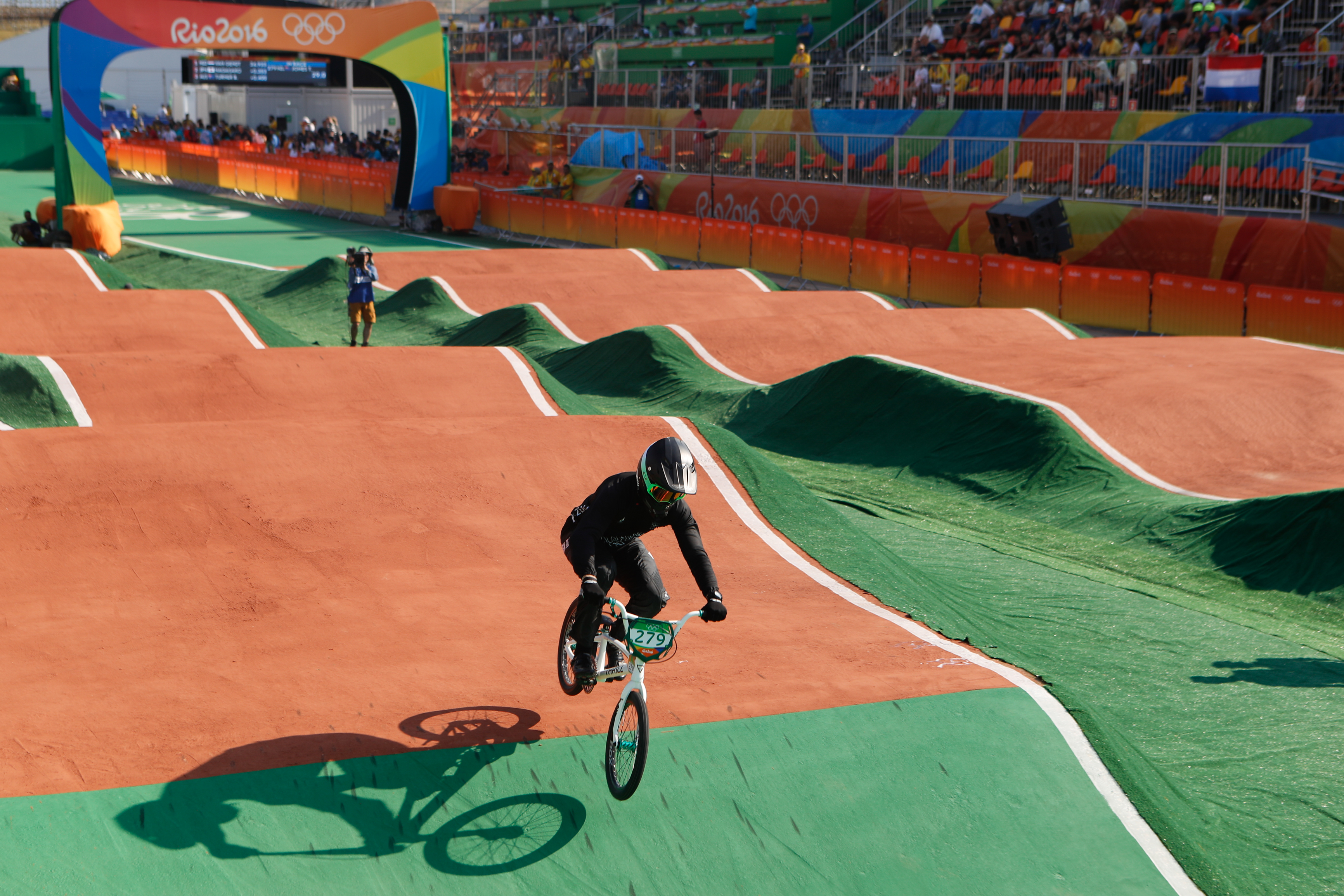 Rio de Janeiro - Ciclista neozelandês Trent Jones compete BMX nos Jogos Olímpicos Rio 2016, no Parque Radical em Deodoro (Fernando Frazão/Agência Brasil)